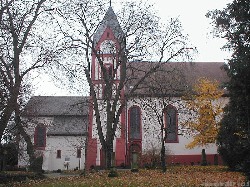 Bergkirche in Osthofen, Rheinland-Pfalz, Deutschland